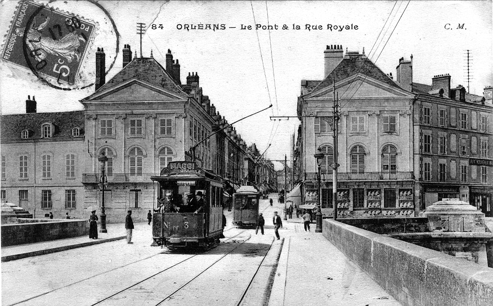 Le Pont et la Rue Royale, Orléans, Loiret, France